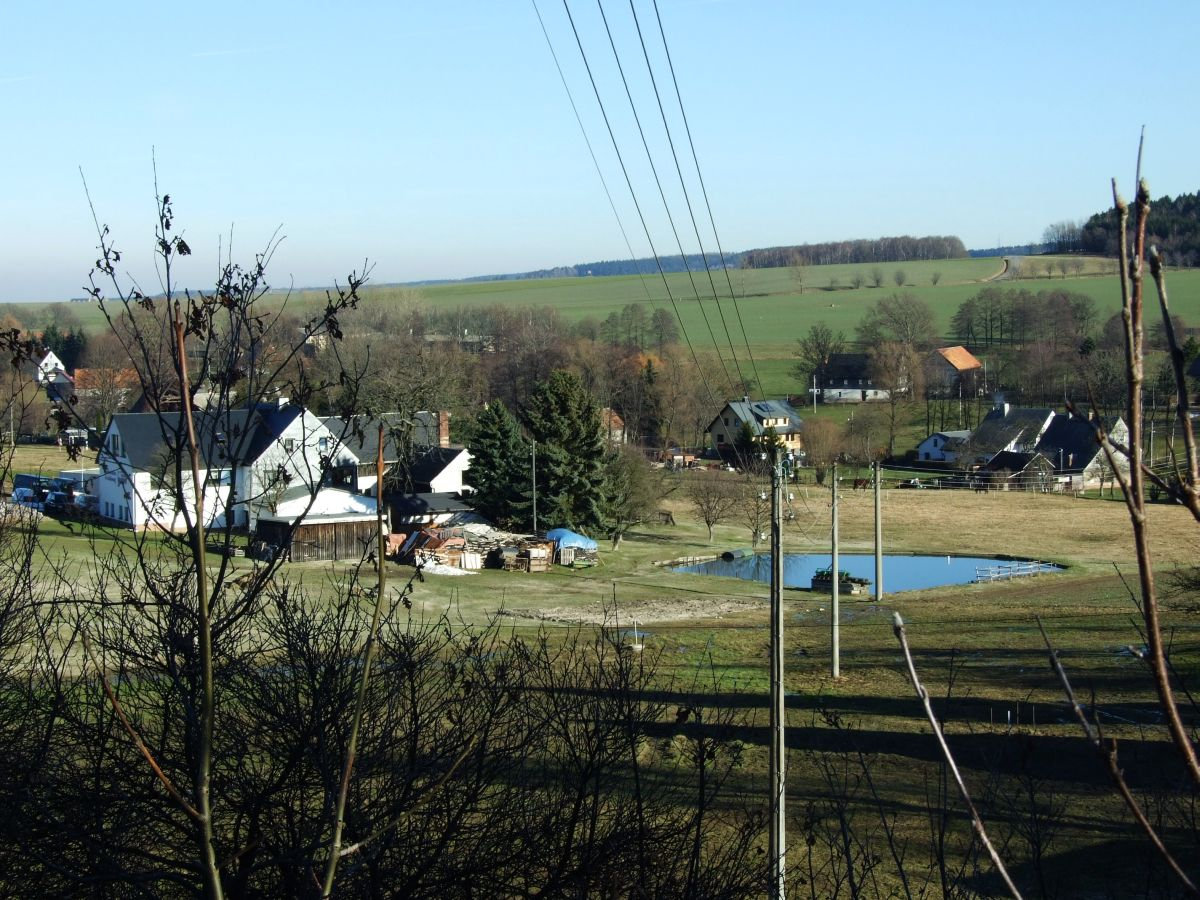 Oberer Ortsteil von Oberdorf